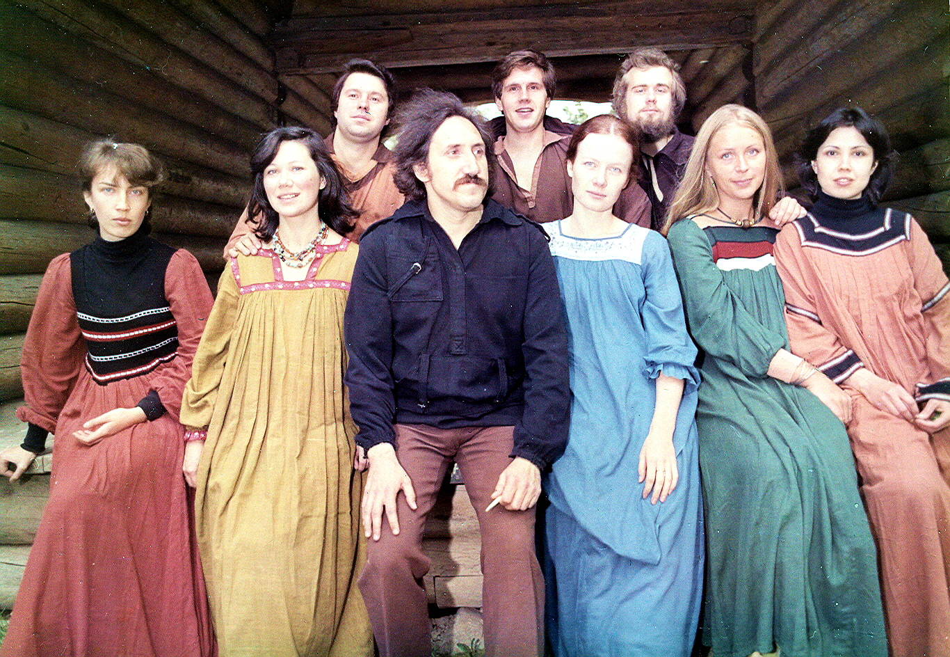 Фотография ансамбля Дмитрия Покровского в Коломенском.